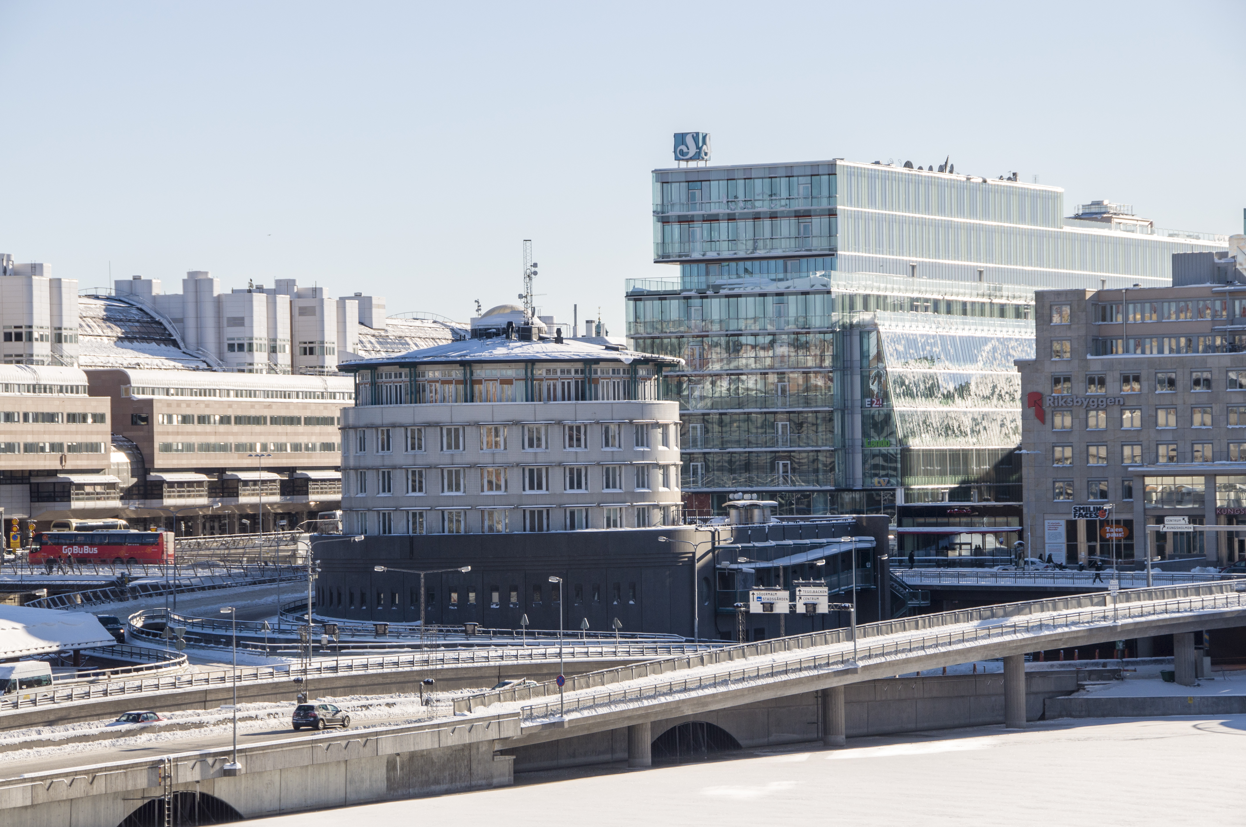 Runda huset, Kungsbron 10 Byggnadsår 1989. Byggherre Banverket